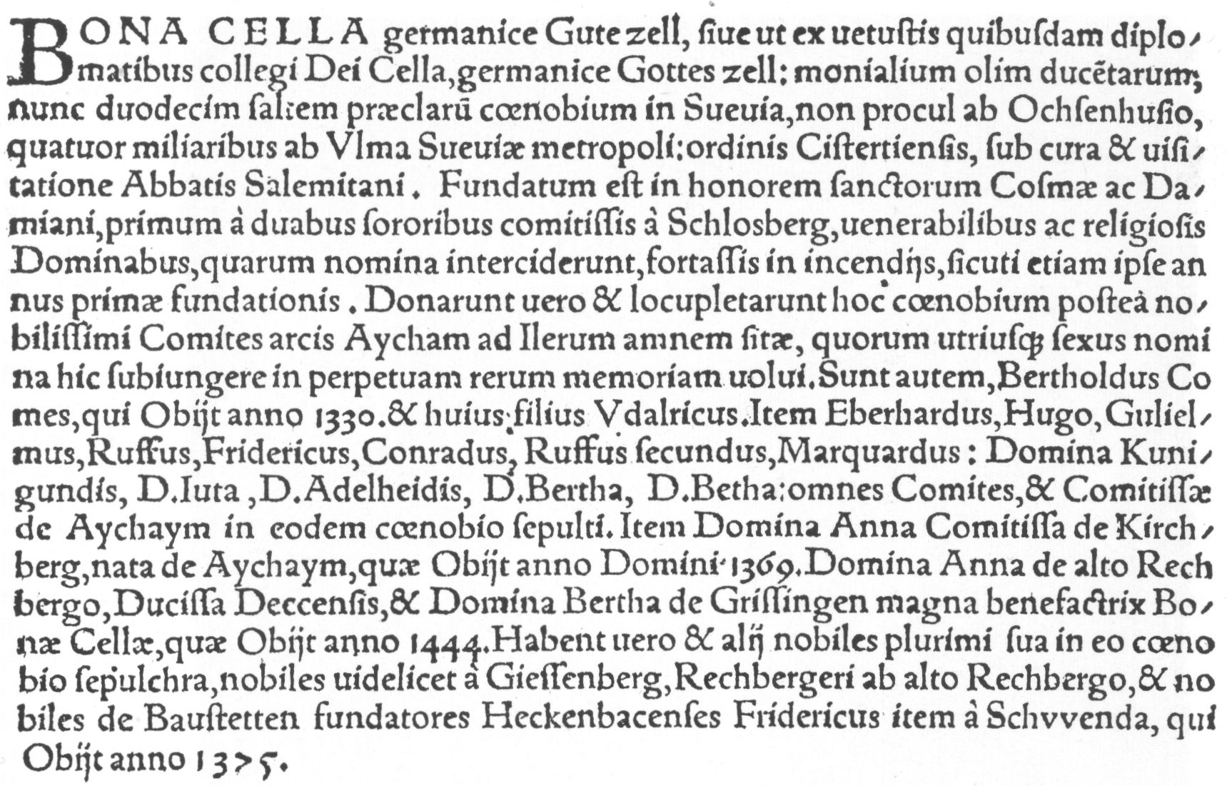 Reichsabtei Gutenzell. Ausschnitt aus der Klosterchronologie von Kaspar Brusch, 1551.